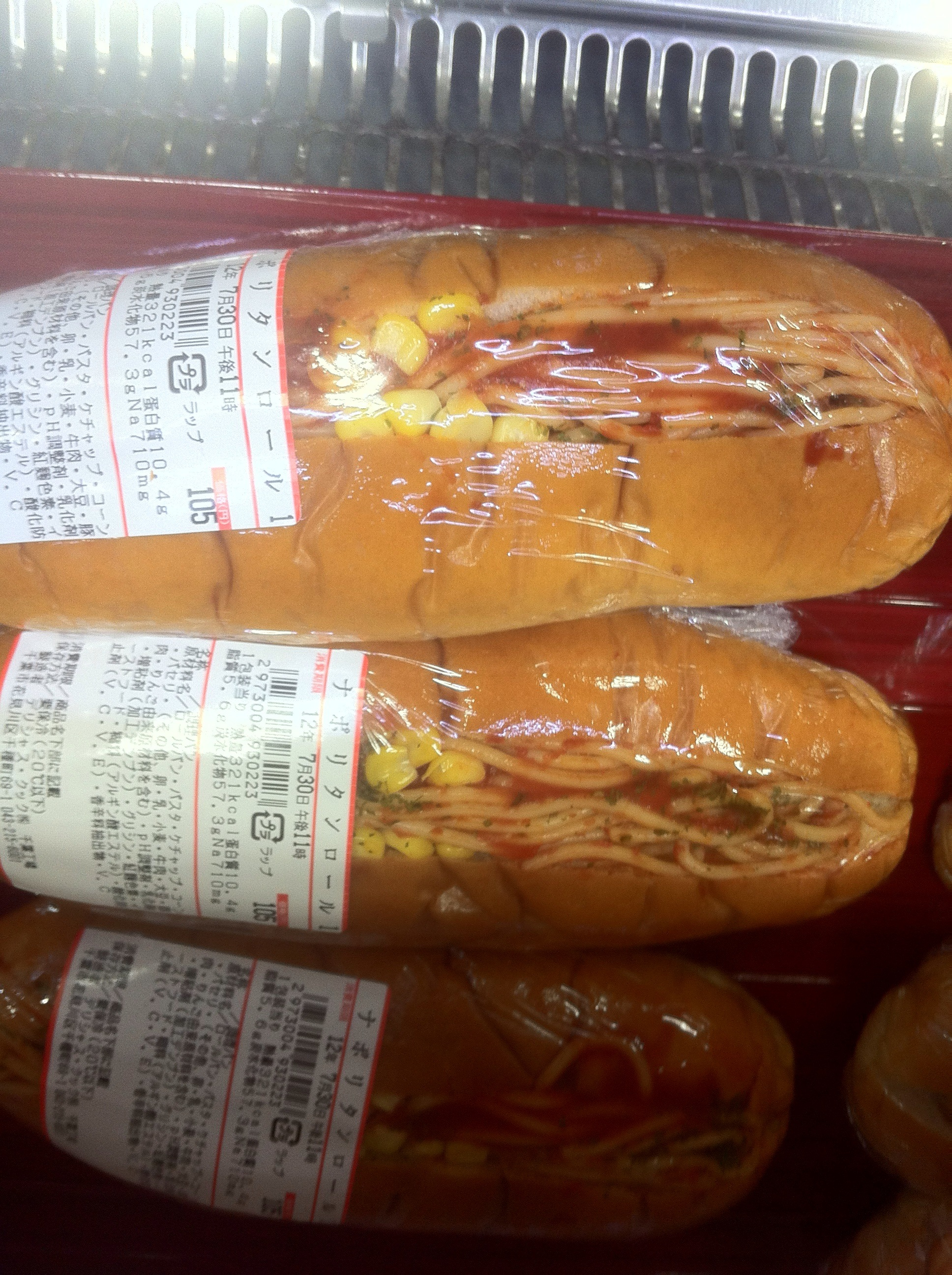 Spaghetti Sandwich